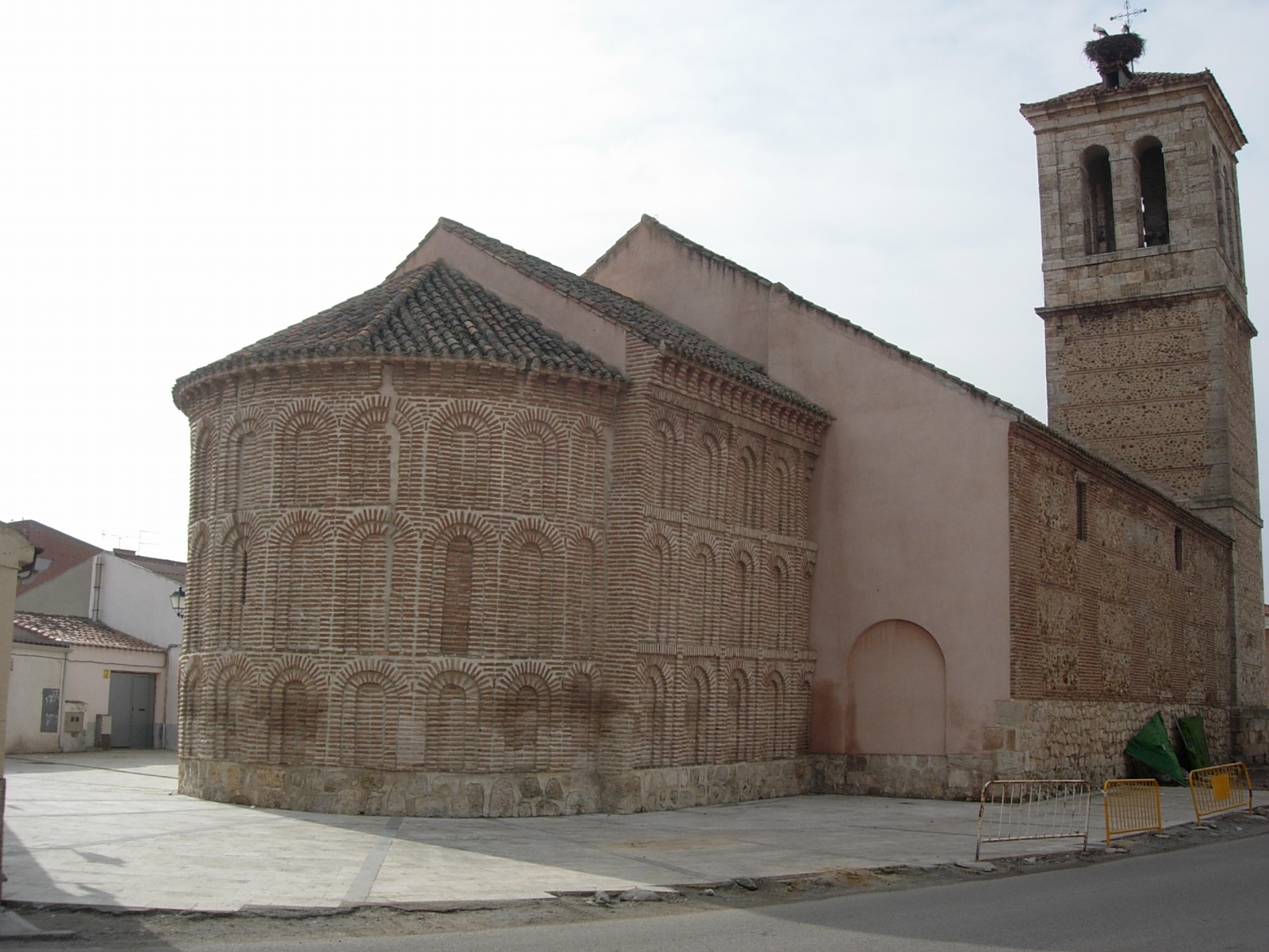 Iglesia parroquial de San Pedro, en Camarma de Esteruelas (Madrid)